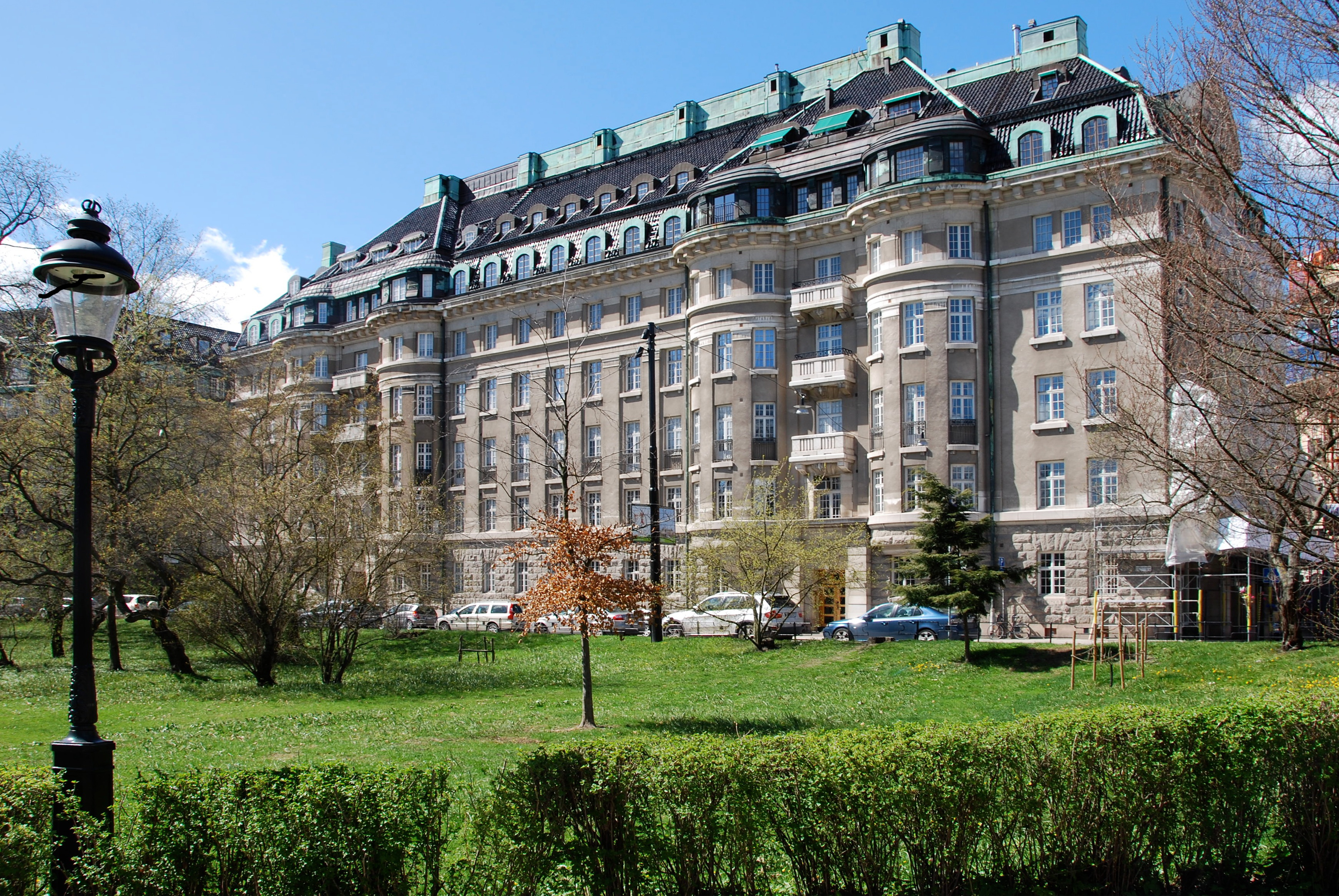 Engelbrektsgatan 23-25, Stockholm. Byggt 1912-1914.